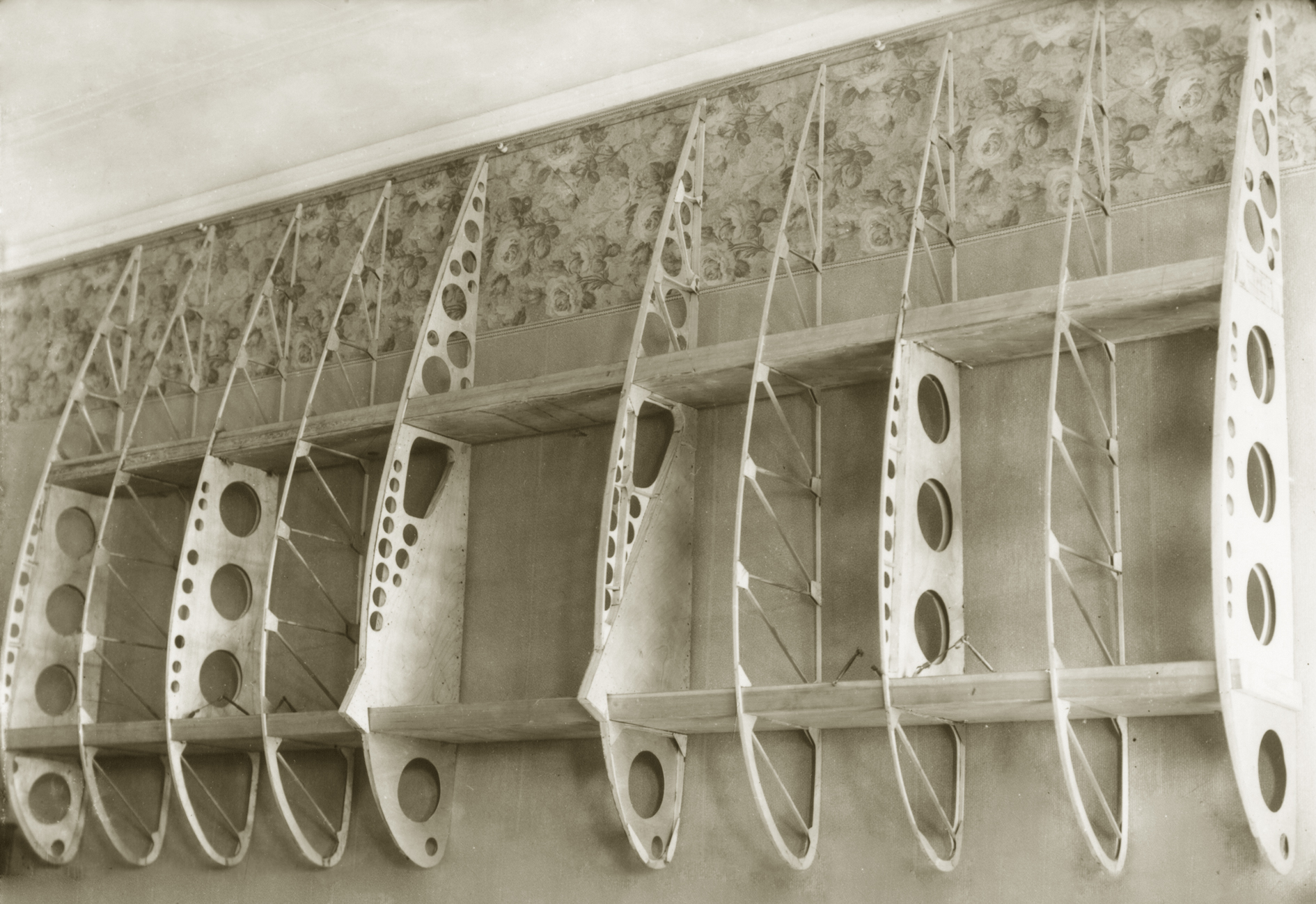 Строительство Ш-1 в квартире Корвин-Кербера